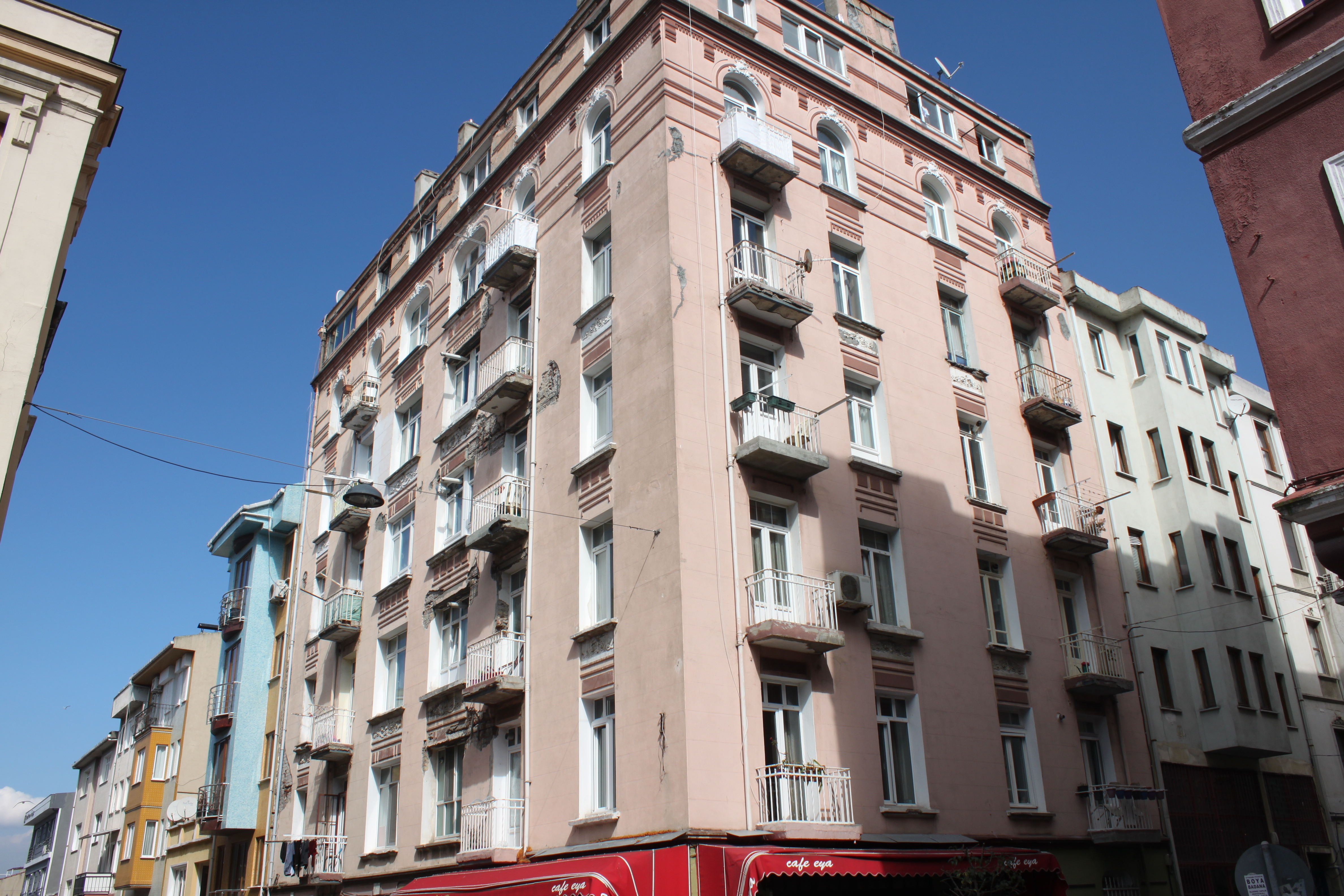 Yeldeğirmeni'ndeki Celal Muhtar Apartmanı